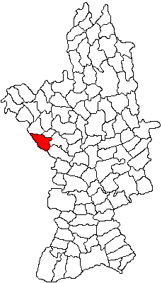 Categorie:Hărţi ale judeţului Olt